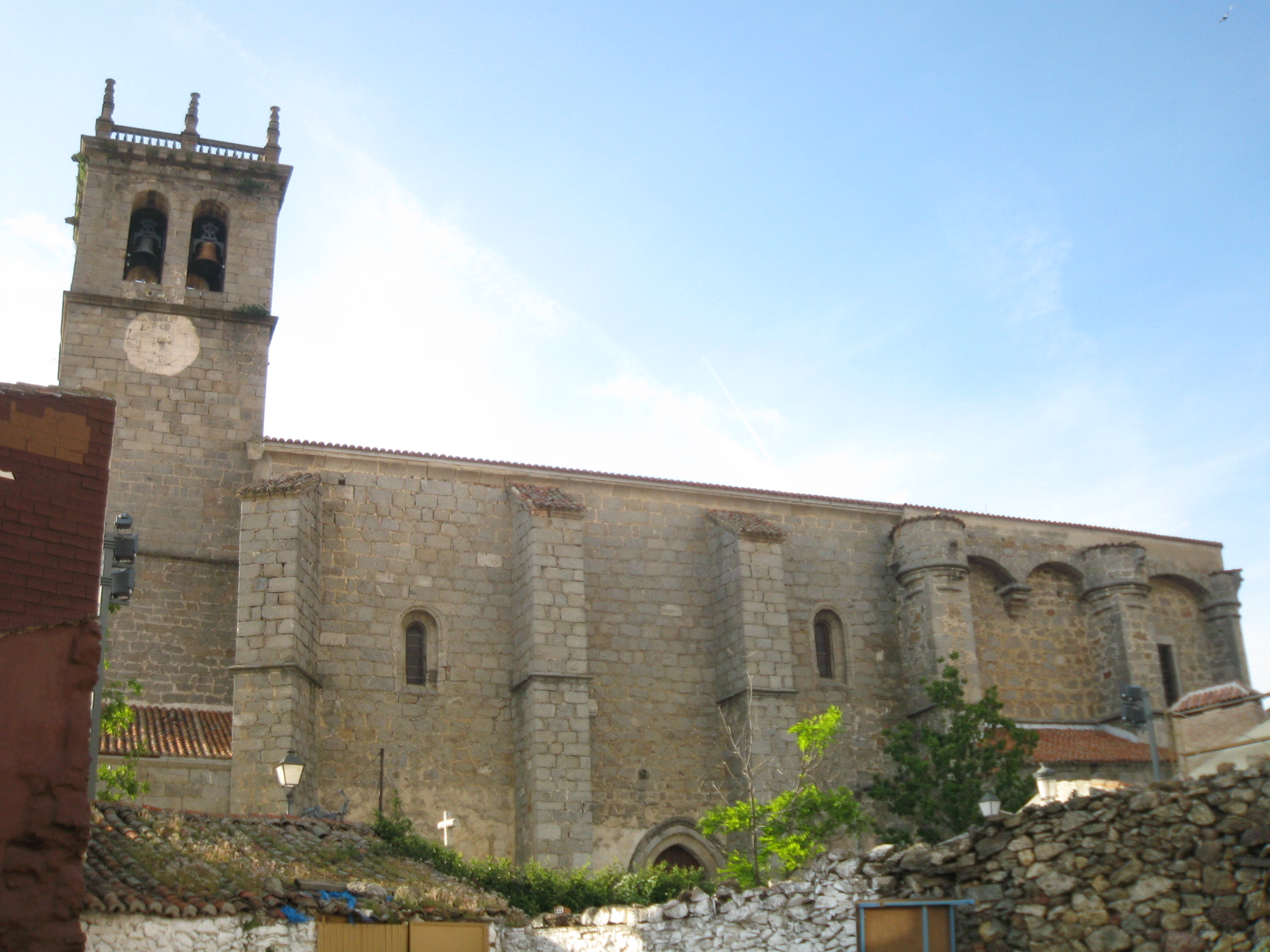 Church in Robledo de Chavela: Iglesia de la Asunción de Nuestra Señora.